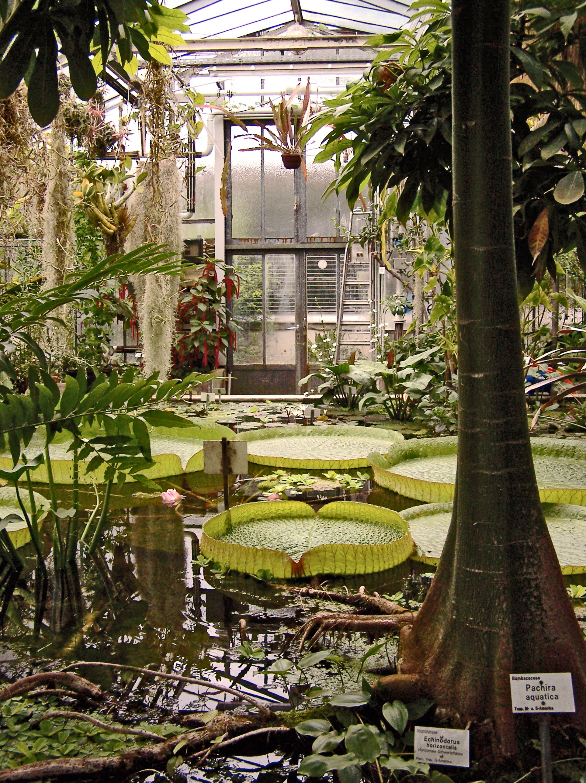 Alter Botanischer Garten der Universität Göttingen